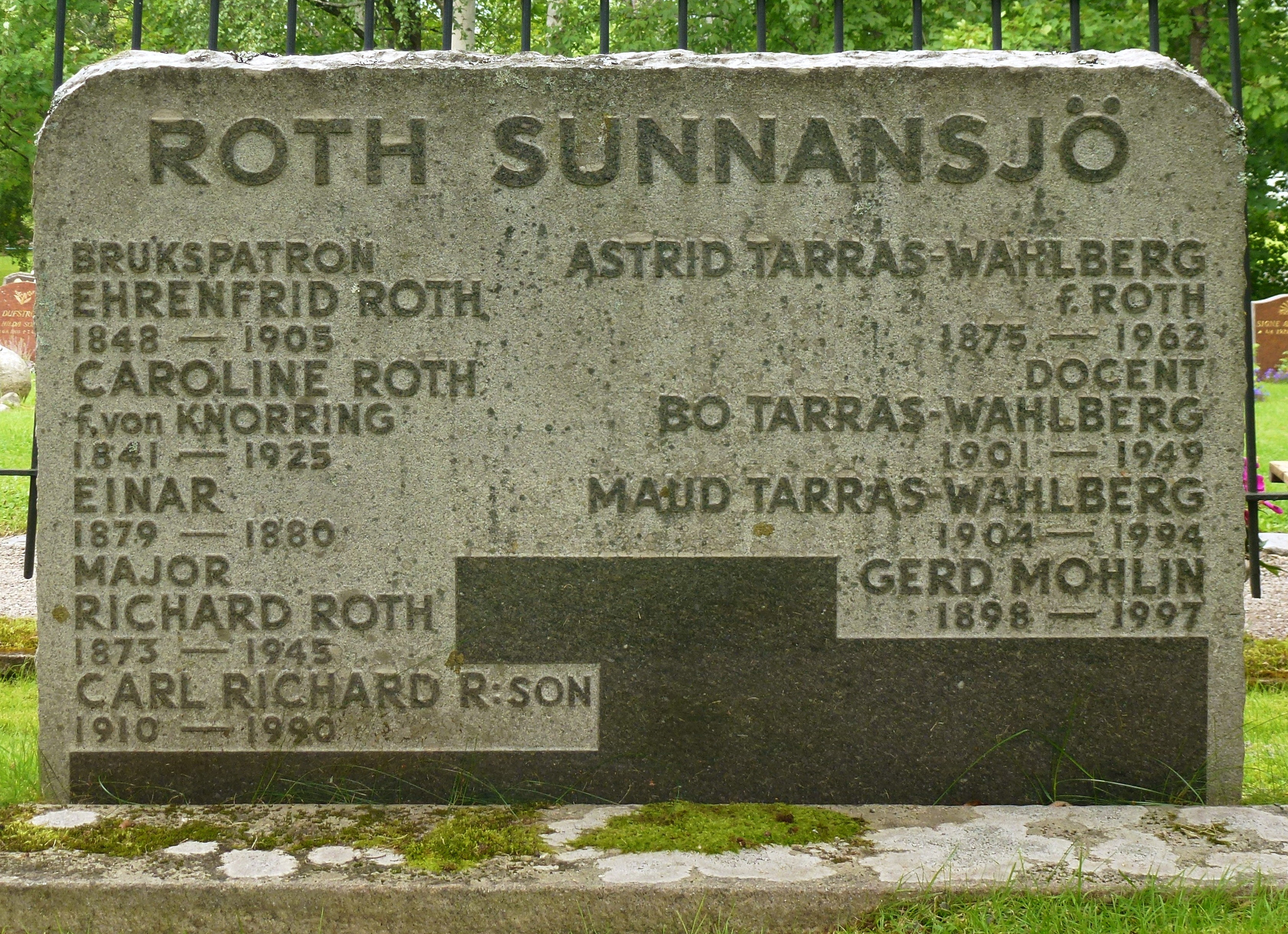 Rots familjegrav (Sunnansjö)